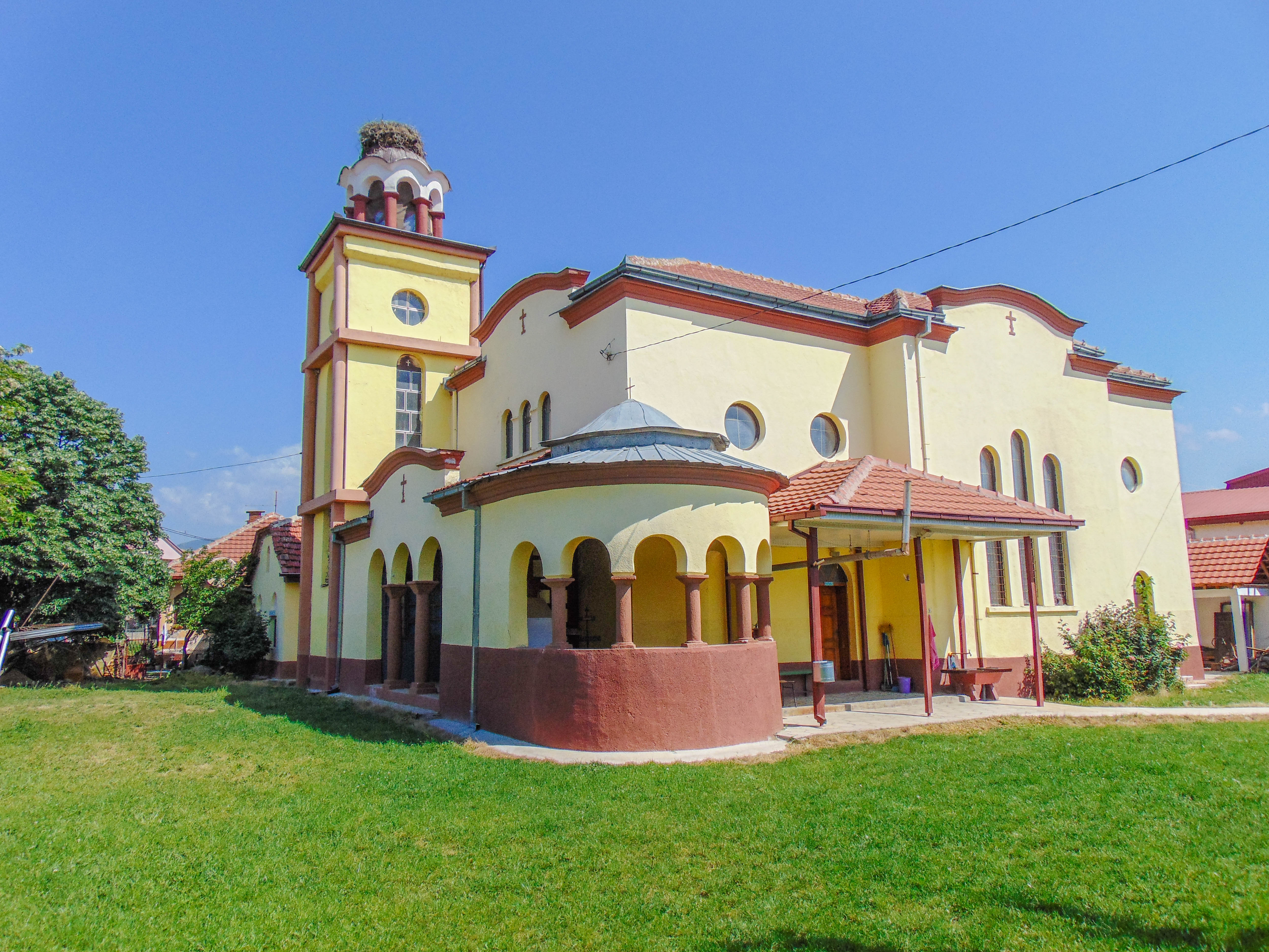 Црква „Св. Ѓорѓи“ - Подареш